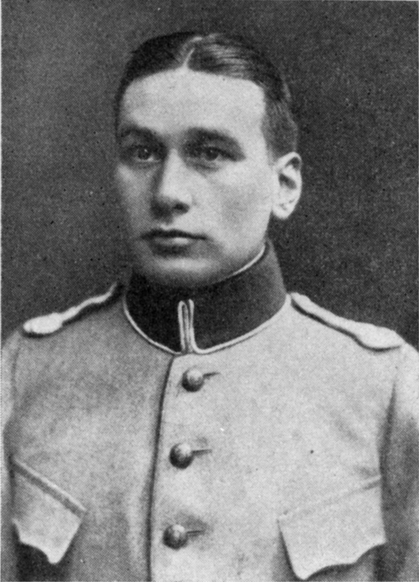 Carl Mothander, the leader of Swedish volunteers in the Estonian War of Independence, the author of Baroner, bönder och bolsjeviker i Estland and Svenske kungens Vita Skepp, det äventyrliga spelet om Estlandssvenskarna